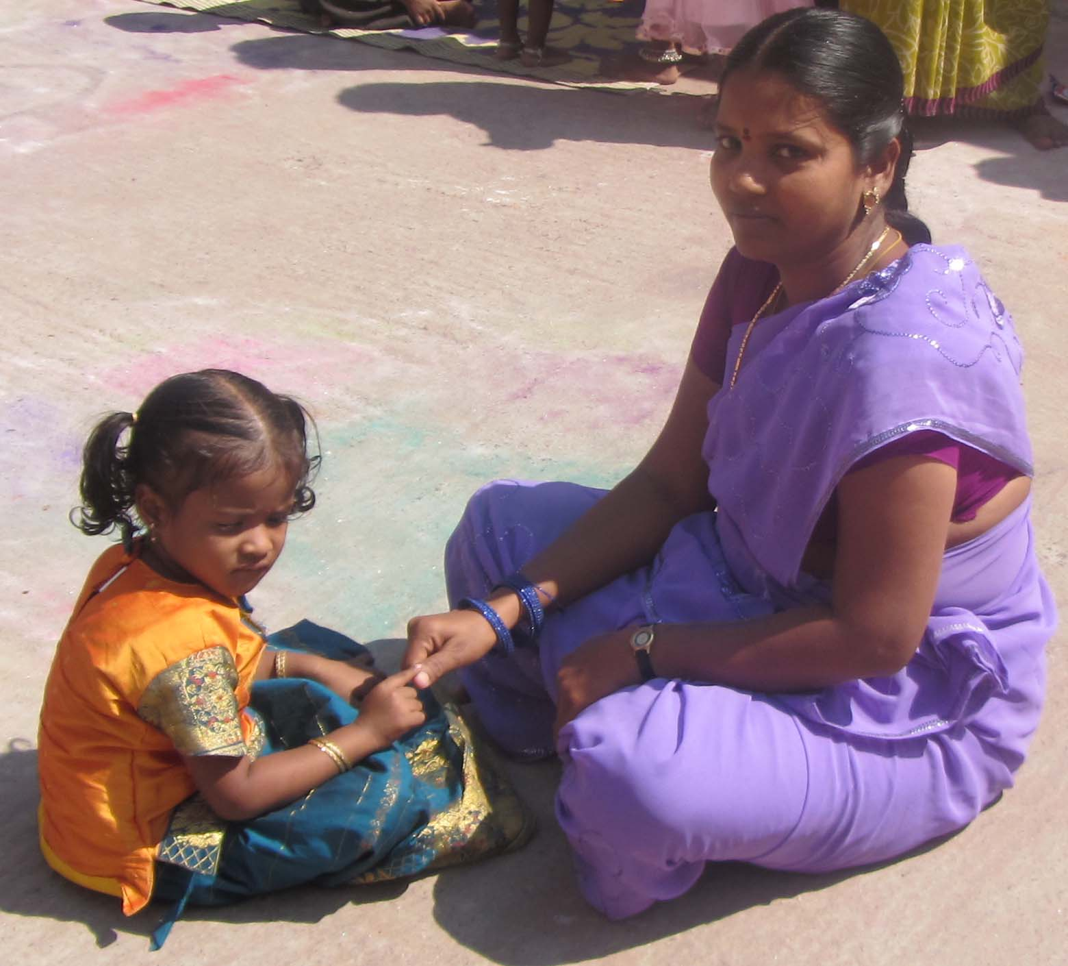 குழந்தையோடு விளையாடும் 'பருப்பு கடை' விளையாட்டு